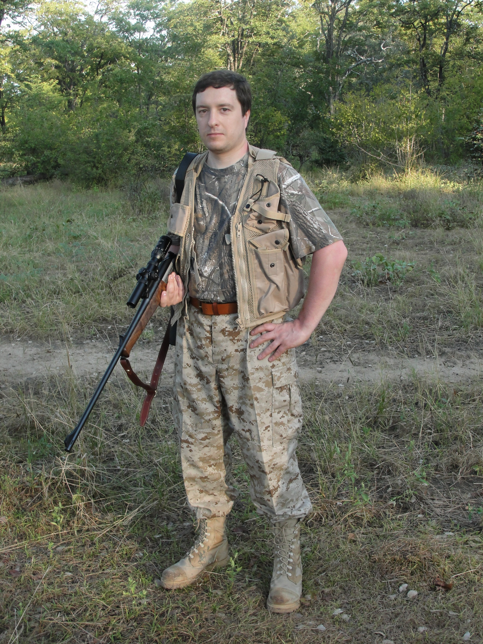 Hunter in Zambia